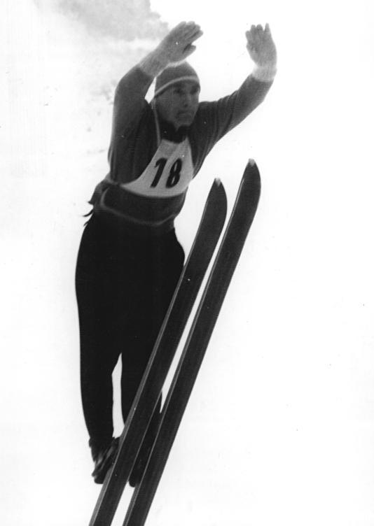 Zentralbild Wendorf 22.1.1959 DDR-Spezialsprungläufer UBz: Dieter Neuendorf (ASK Brotterode).